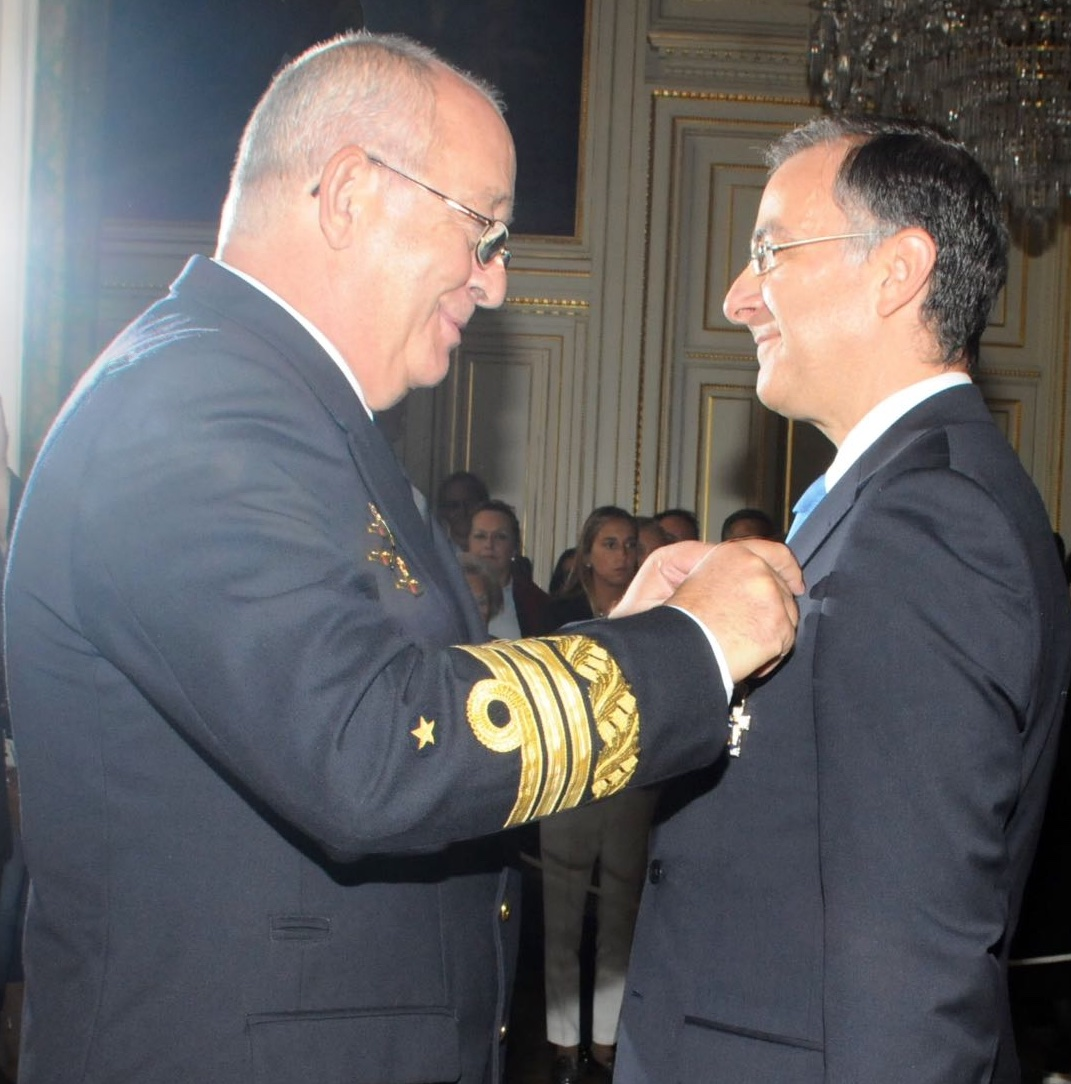 Acto de Condecoración de la Cruz del Mérito Naval a Juan de Dios Ruano Gómez por parte del Almirante Jefe del Estado Mayor de la Armada.